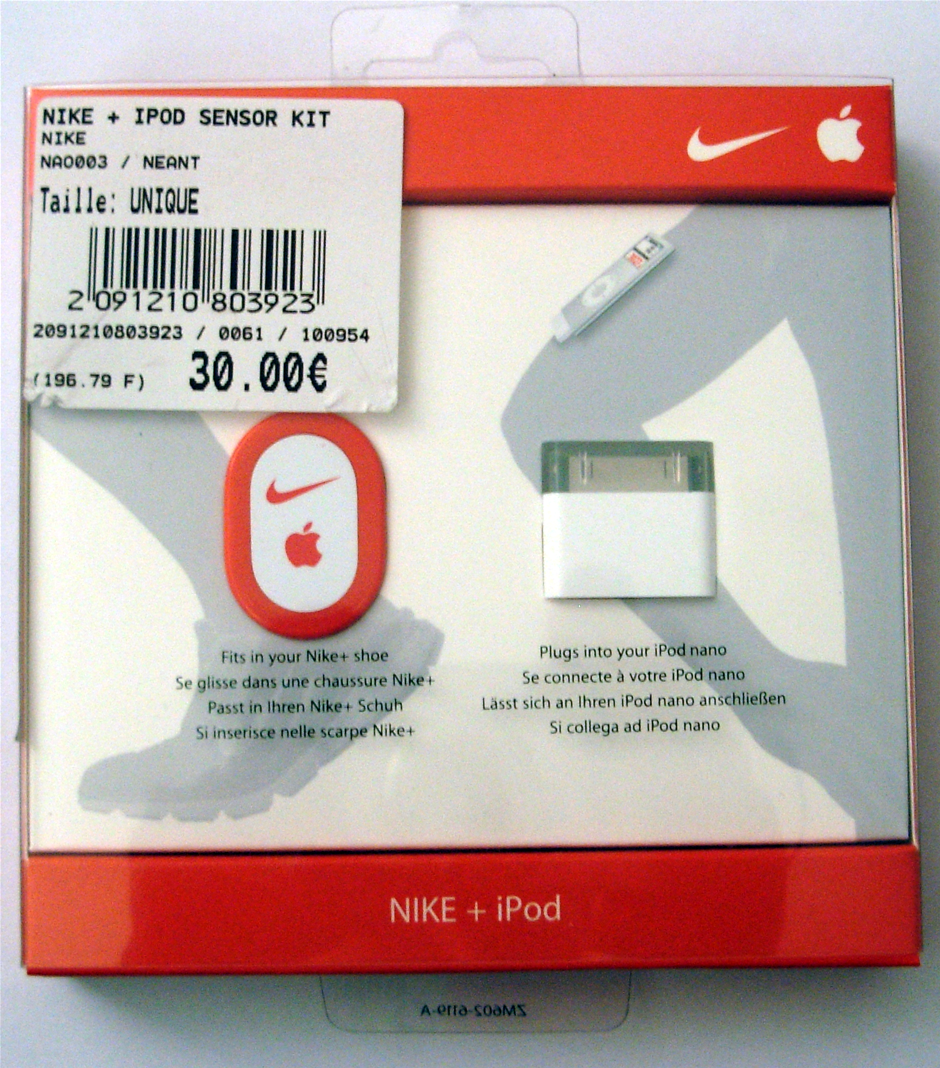 Kit Nike+ dans sa boite